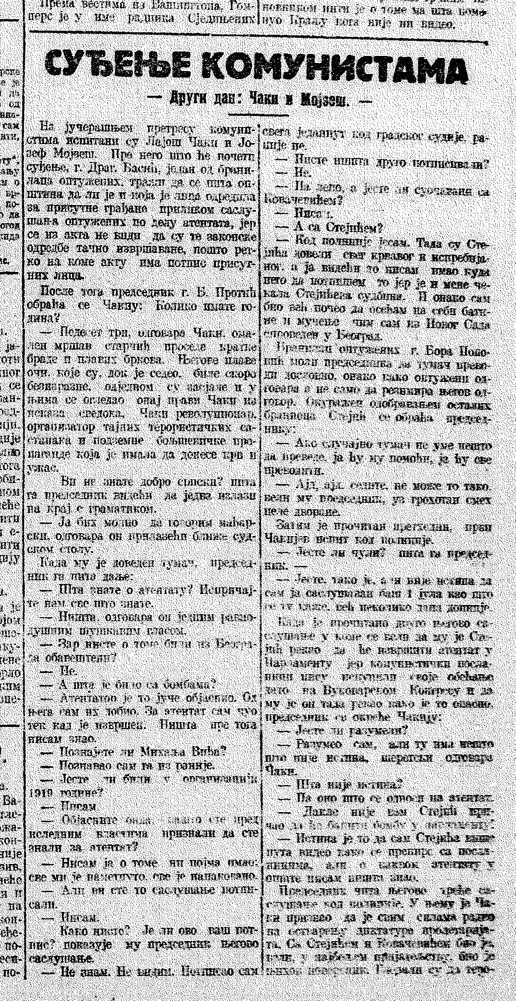 Srpskohrvatski / српскохрватски: Politika od 27. 01. 1922. Detalj naslovnice o suđenju komunistima nakon neuspelog atentata na regenta Aleksandra.